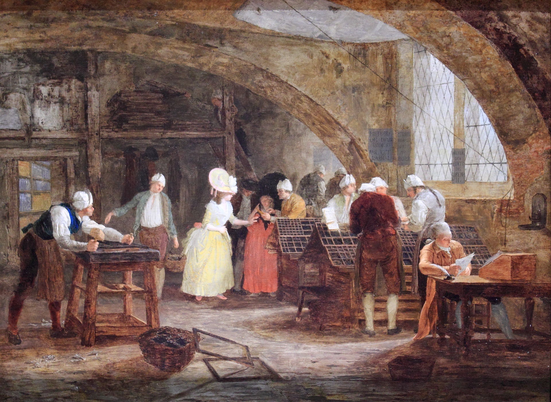 Léonard Defrance (1735–1805): Besuch in der Druckerei, Setzerei. Öl auf Holz, 47 x 64,5 cm. Musée des Beaux-Arts de Grenoble. (Eine zugehörige Darstellung der Druckerpressen befindet sich in einer Privatsammlung in Lüttich.)